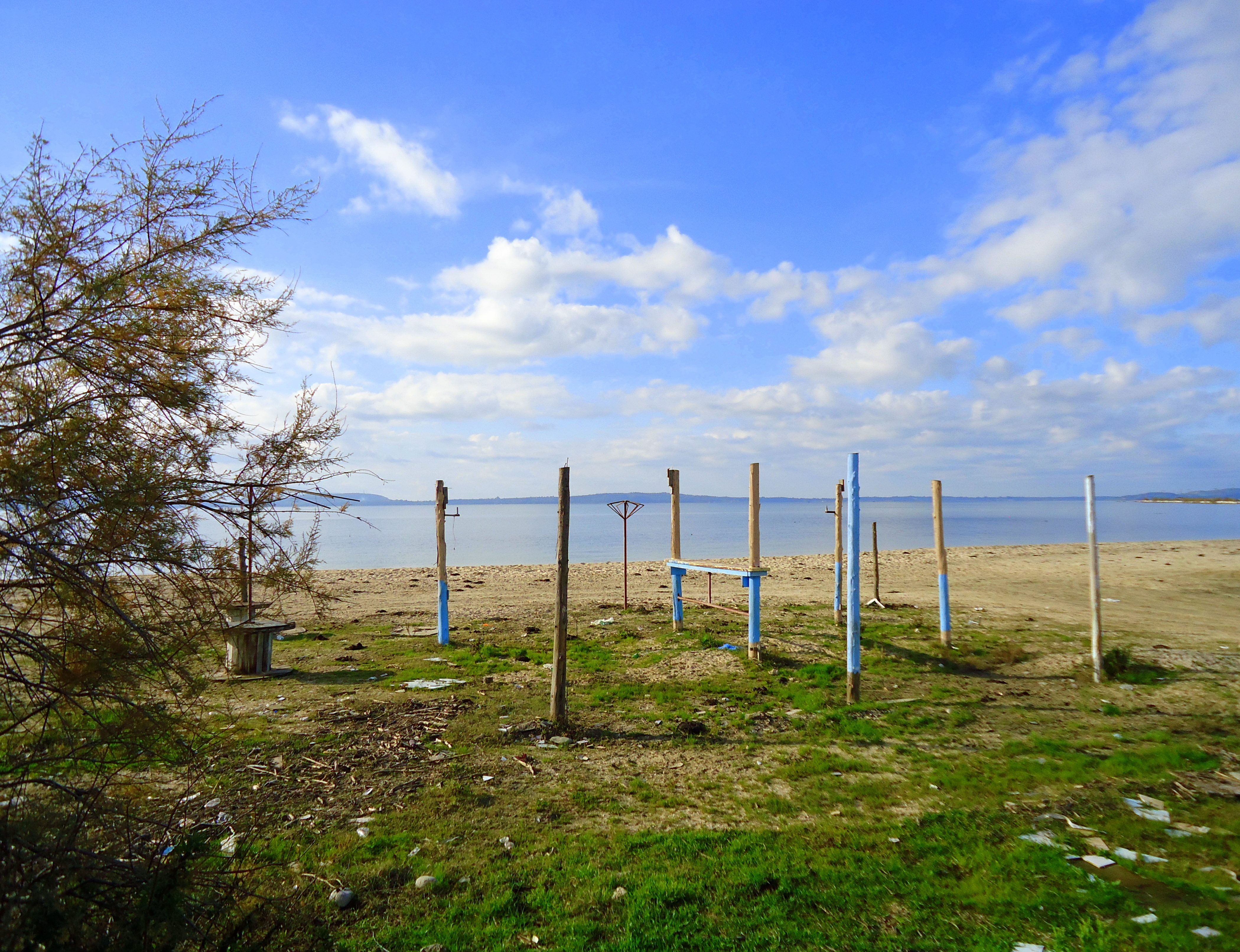 Η παραλία Ράμμα Σαλαώρας.